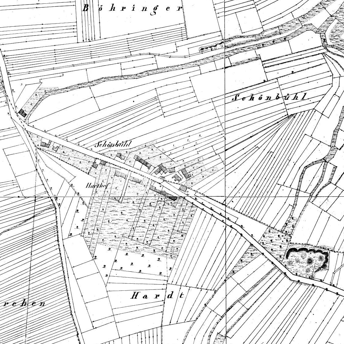 Hardt- und Schönbühlhof auf der württembergischen Urflurkarte (1831) Composit aus vier Planquadraten (Maßstab 1:2500): Planquadrate NW XXXVI 1 und 2, Planquadrate NW XXXVII 1 und 2. Nördlicher Teil Markung Markgröningen, südlicher Teil Markung Schwieberdingen